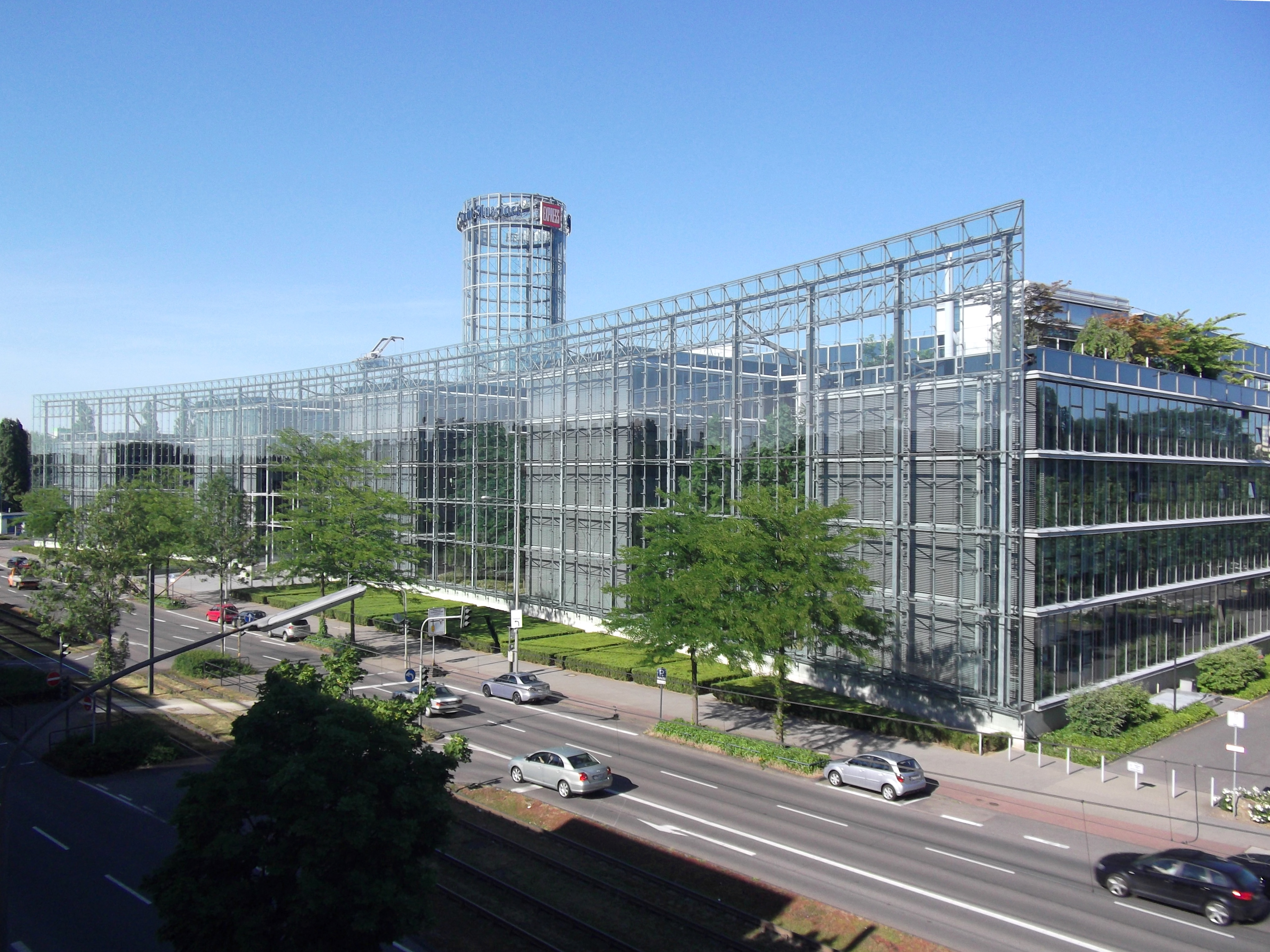 Cologne (Köln); Germany: Köln-Niehl: M. DuMont Schauberg: Amsterdamer Str. 192: Neven DuMont-Haus